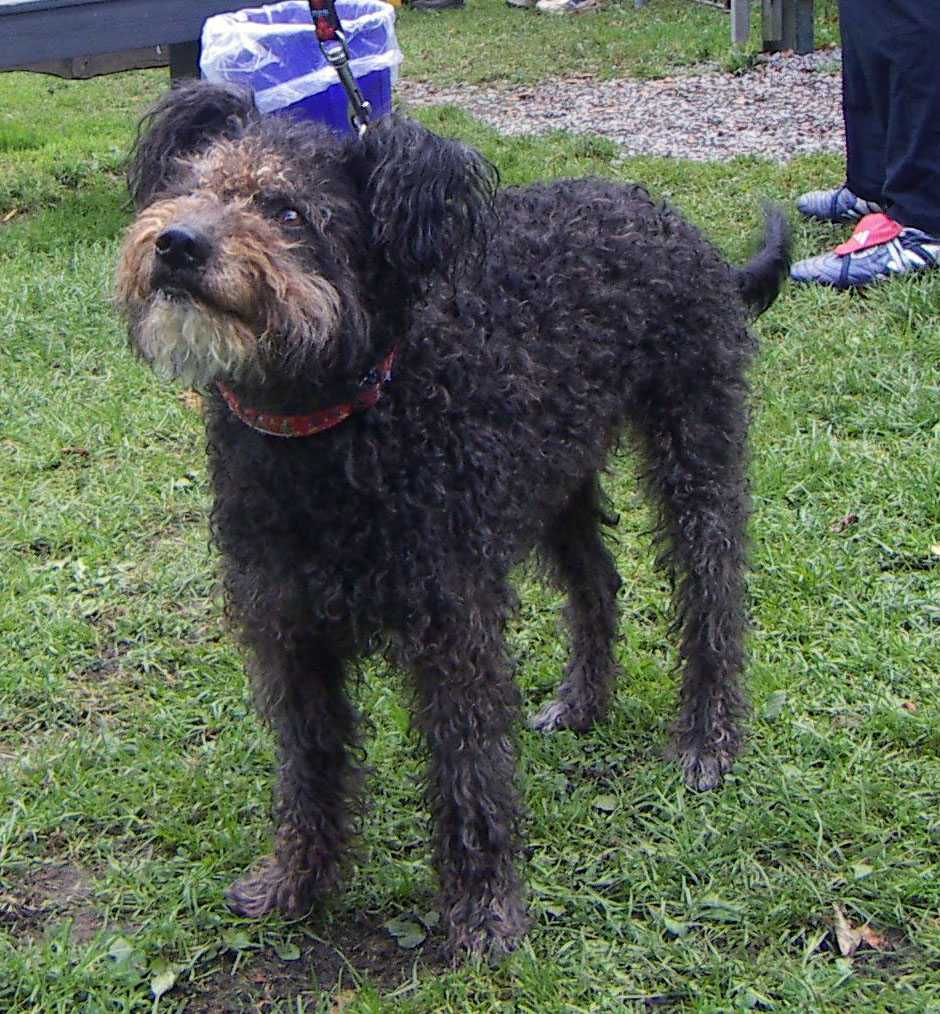 Pumi selbst fotografiert am 10.9.2005 von steffen heinz (caronna)